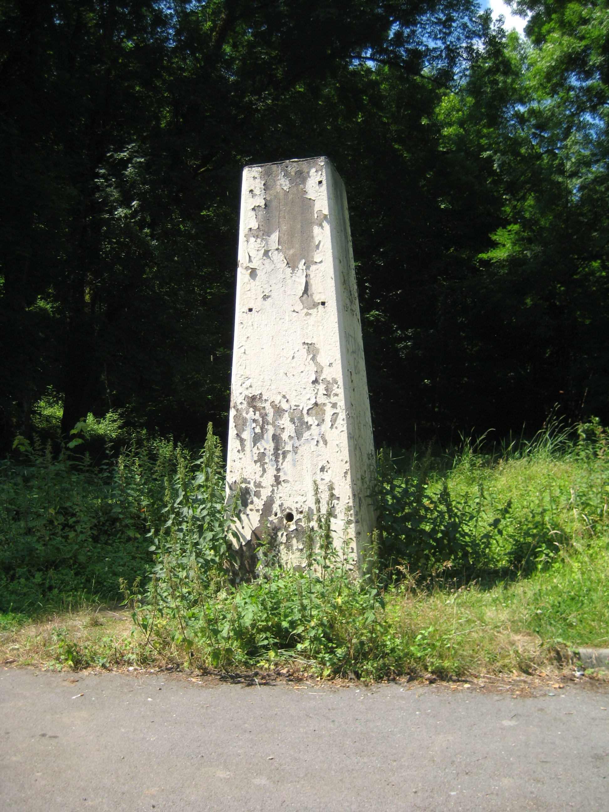 Description Ancienne fontaine de la source du Pérotin Date26 June 2009Sourcemon appareil photoAuthorAimelaime Ancienne fontaine de la source du Pérotin